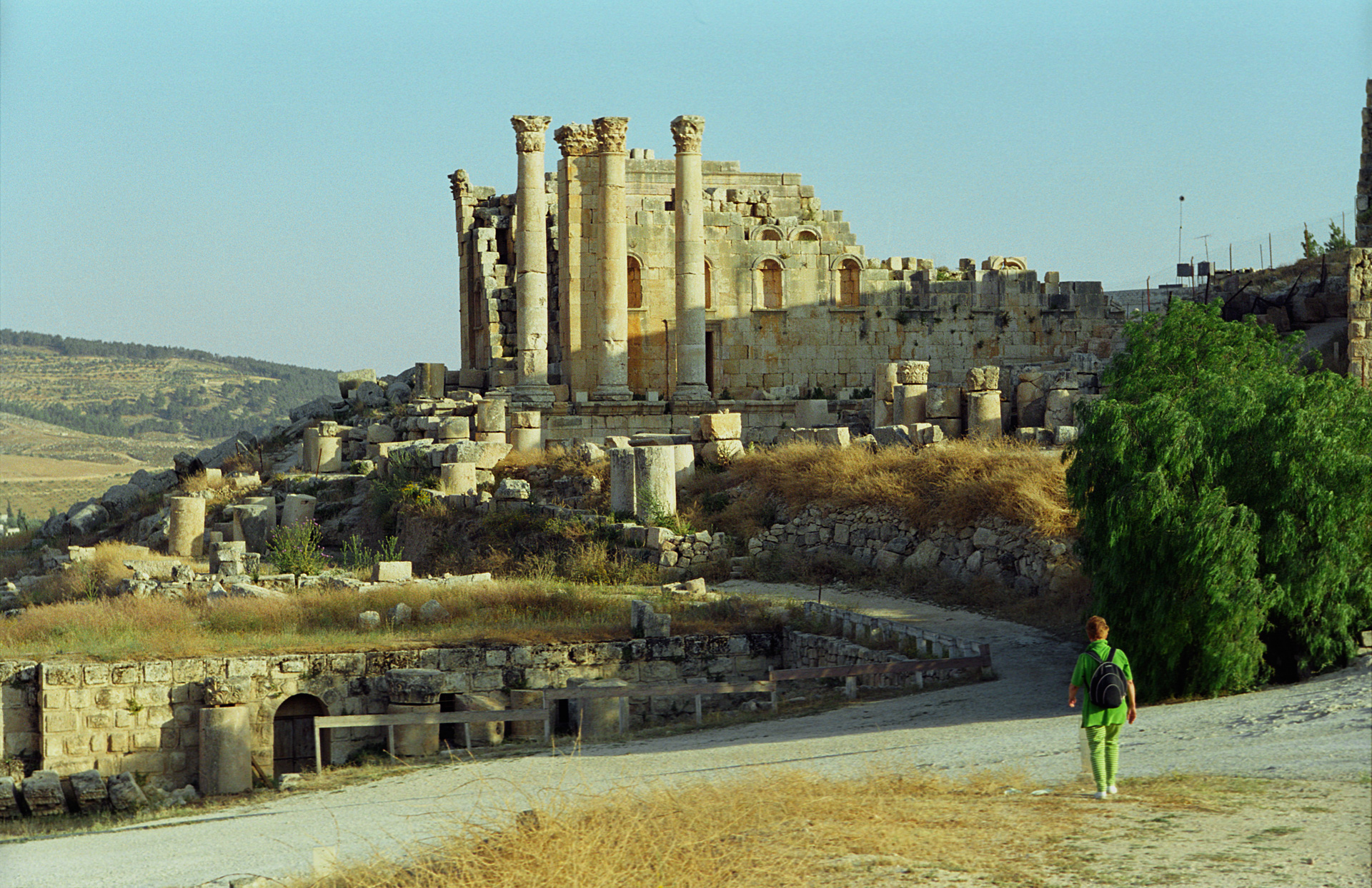 Jerash, Jordan